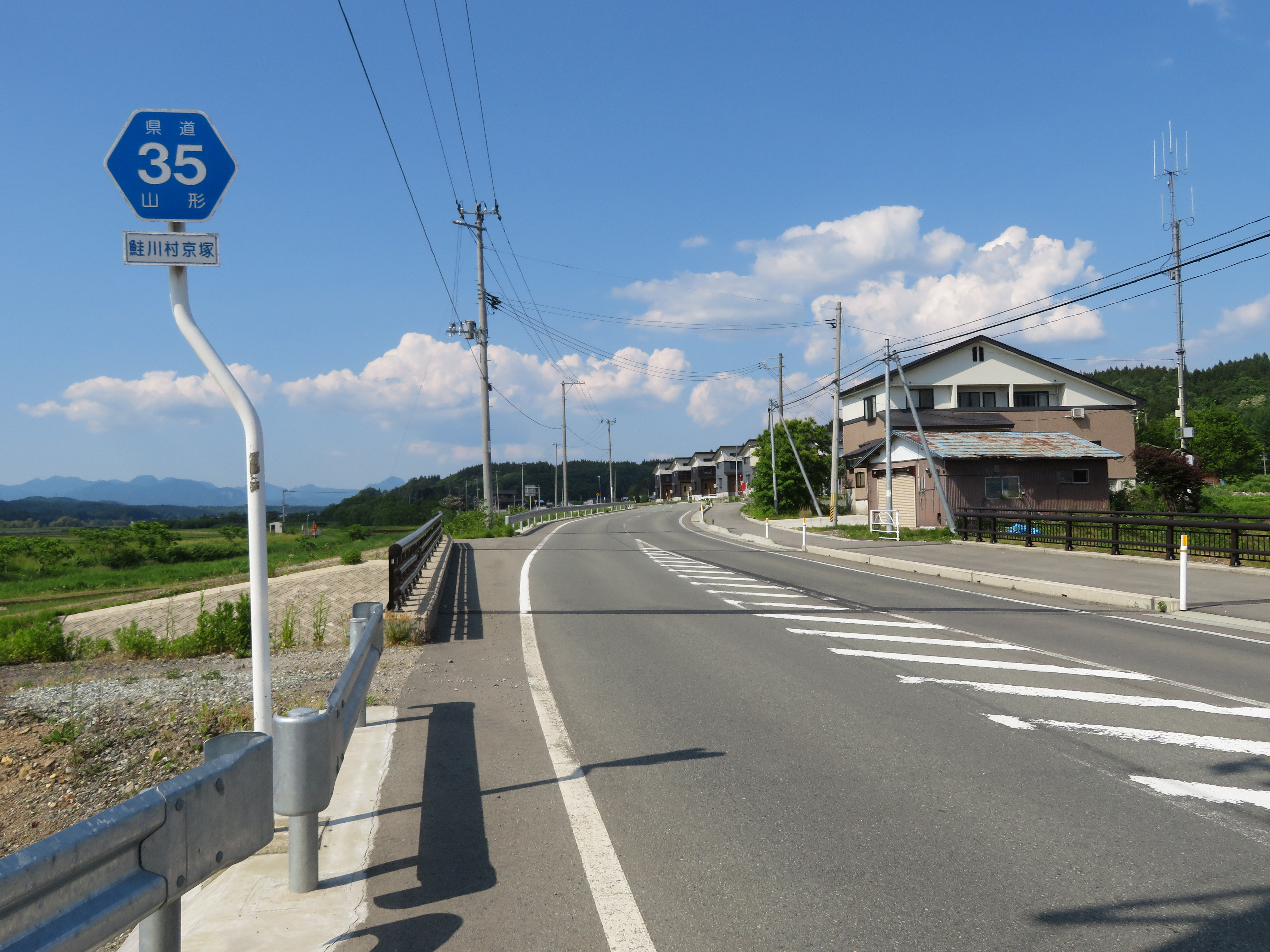 山形県道35号線最上郡鮭川村京塚付近（真室川方面を撮影）